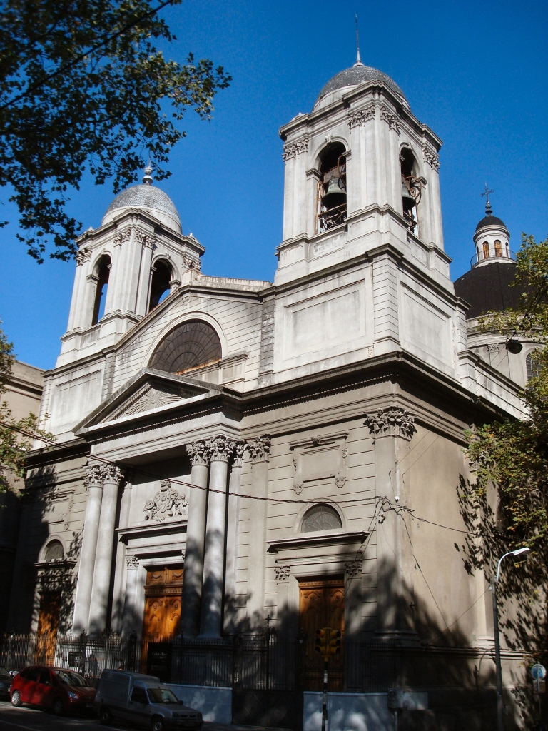 Parroquia del Sagrado Corazón (Jesuitas), Cordón, Montevideo, Uruguay.